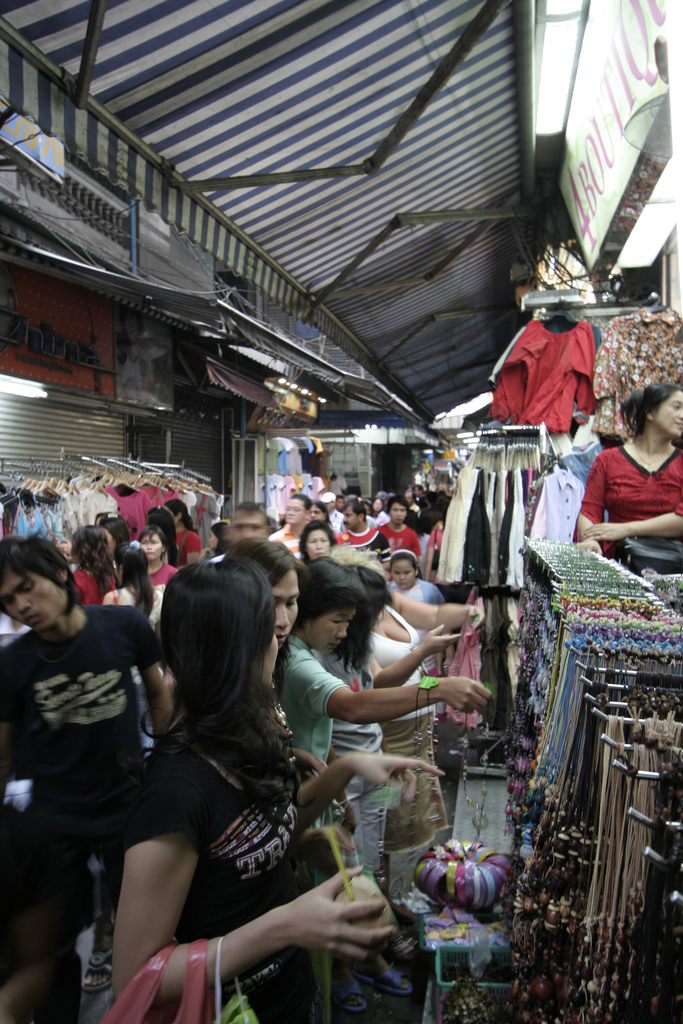 Pratunam Market